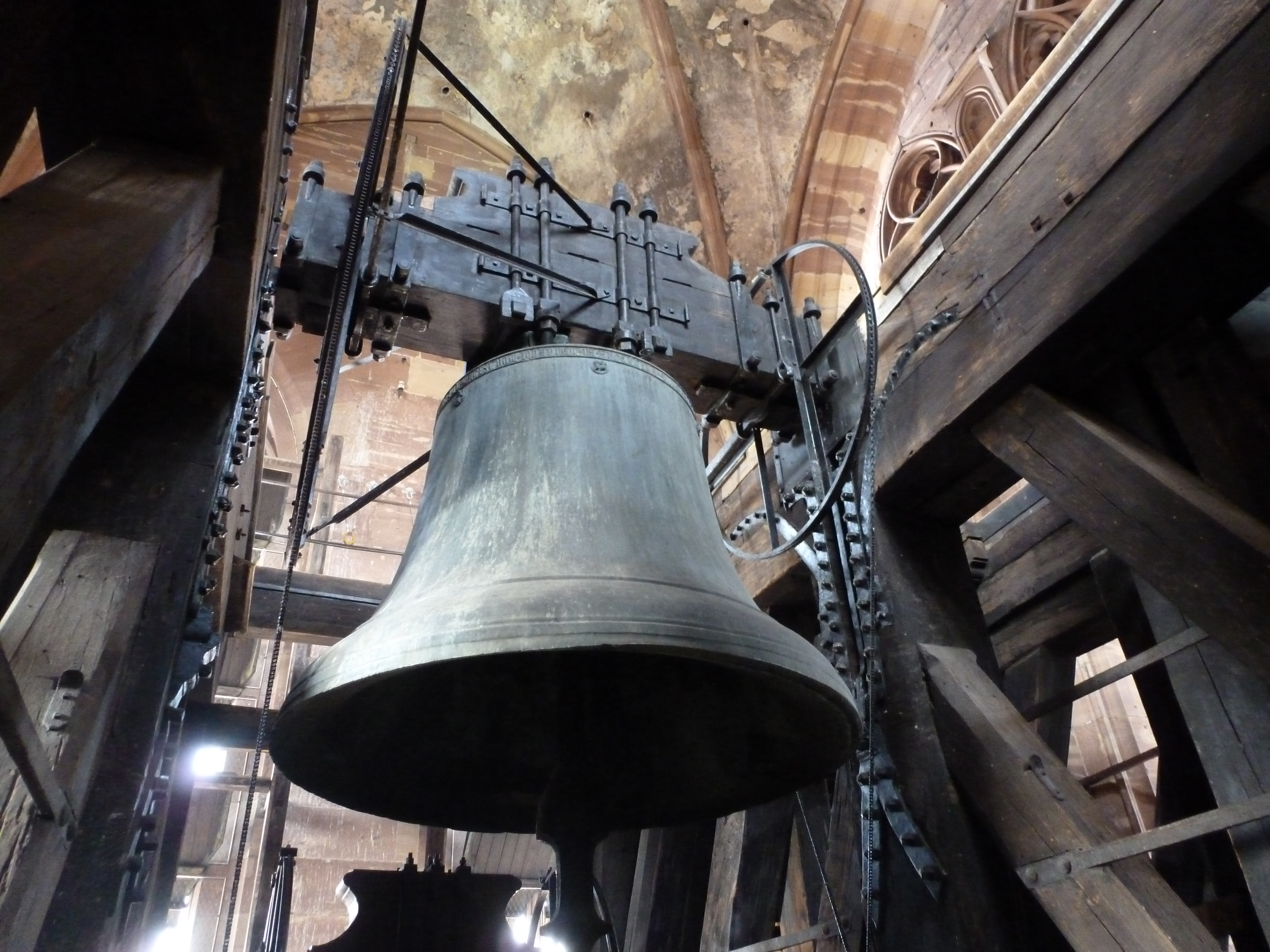 Cloches de la cathédrale de Strasbourg dans le beffroi central.